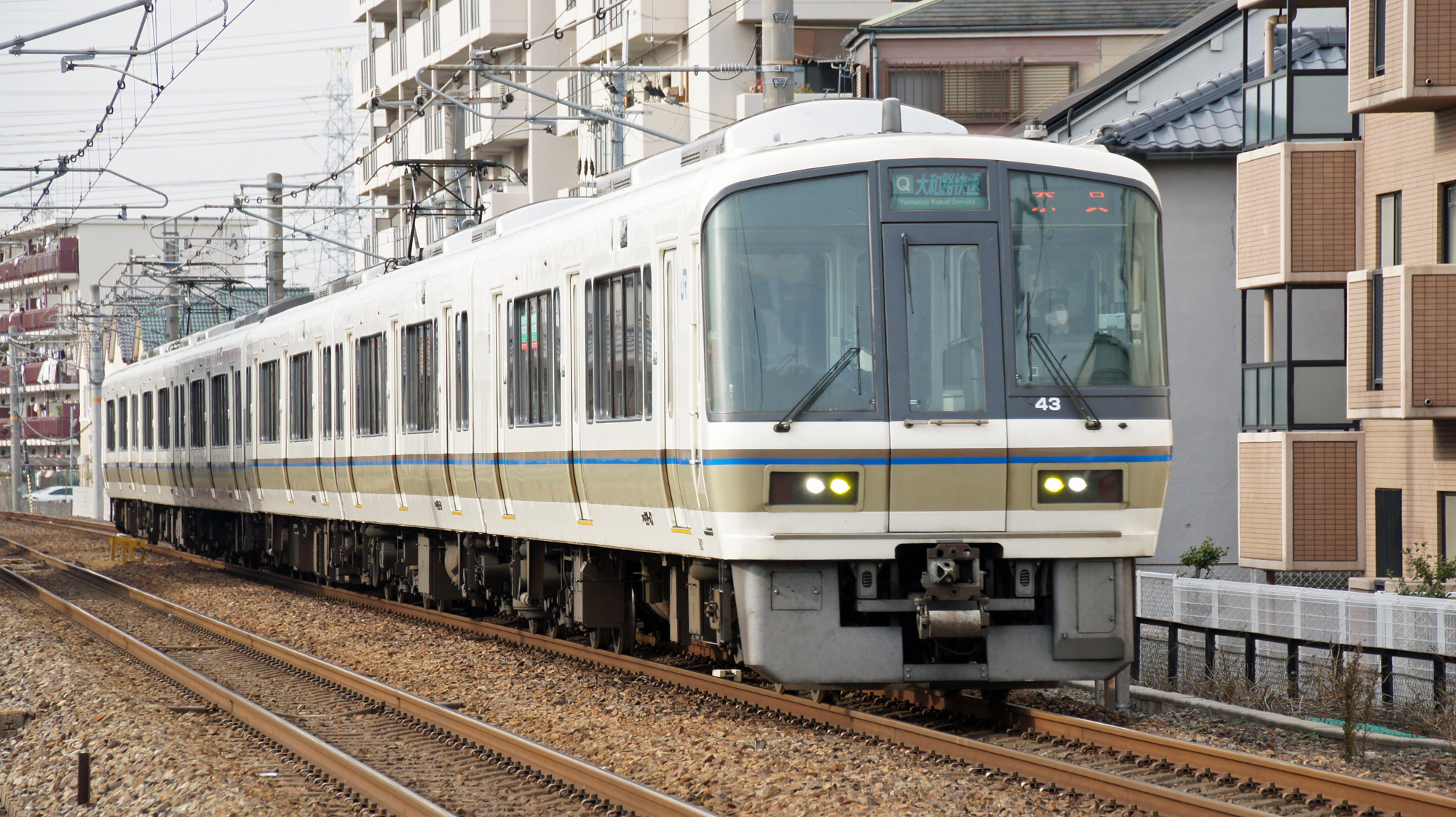 221系による大和路線の大和路快速 奈良行